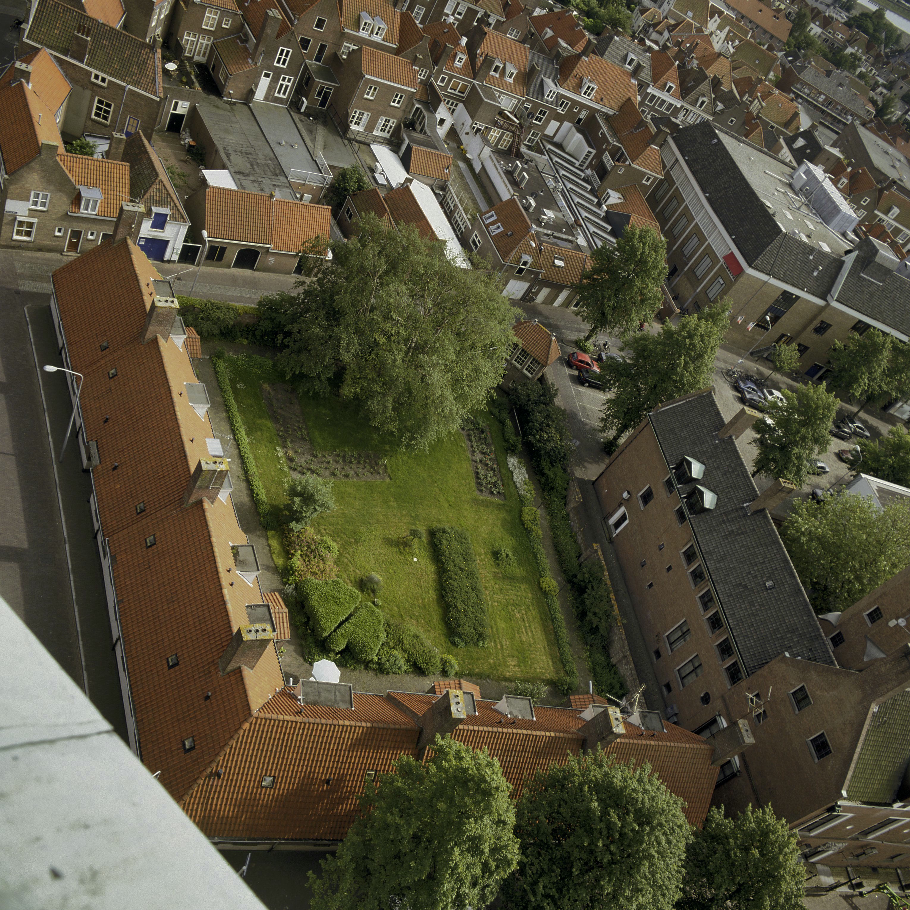 Hofje Onder Den Toren: Overzicht van het hofje gezien vanuit de Abdijtoren of Lange Jan (opmerking: Gefotografeerd voor Toonbeelden van de Wederopbouw)